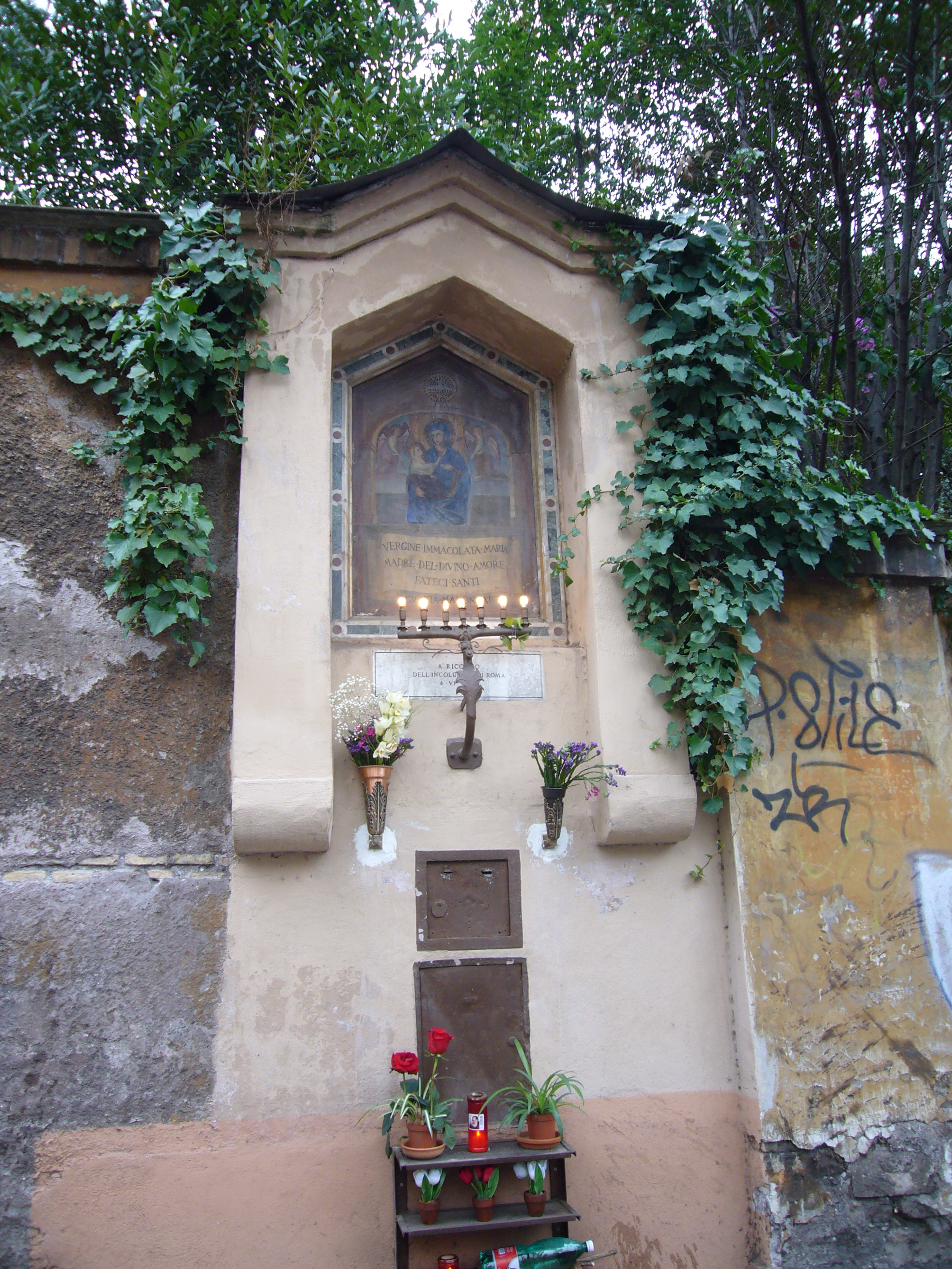 Roma, Madonna del Divino Amore a via Nomentana